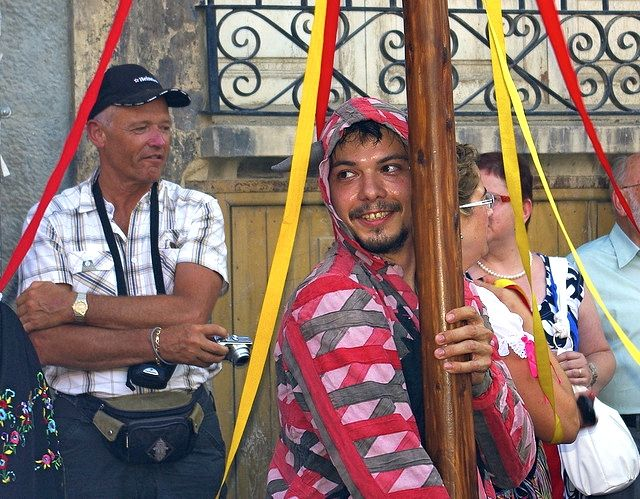 El Diable que aguanta el pal de les cintes del Ball de Gitanes de Reus. Festa major de 2007